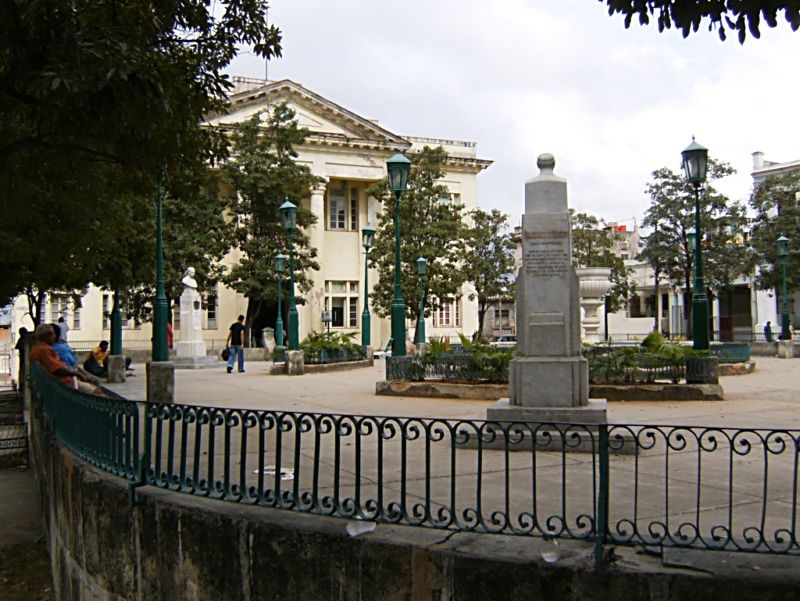 Parque Guaicanamar, en el centro del municipio Regla (Ciudad de la Habana). Cuba. Al fondo el edificio del Gobierno Municipal